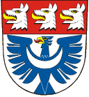 znak obce